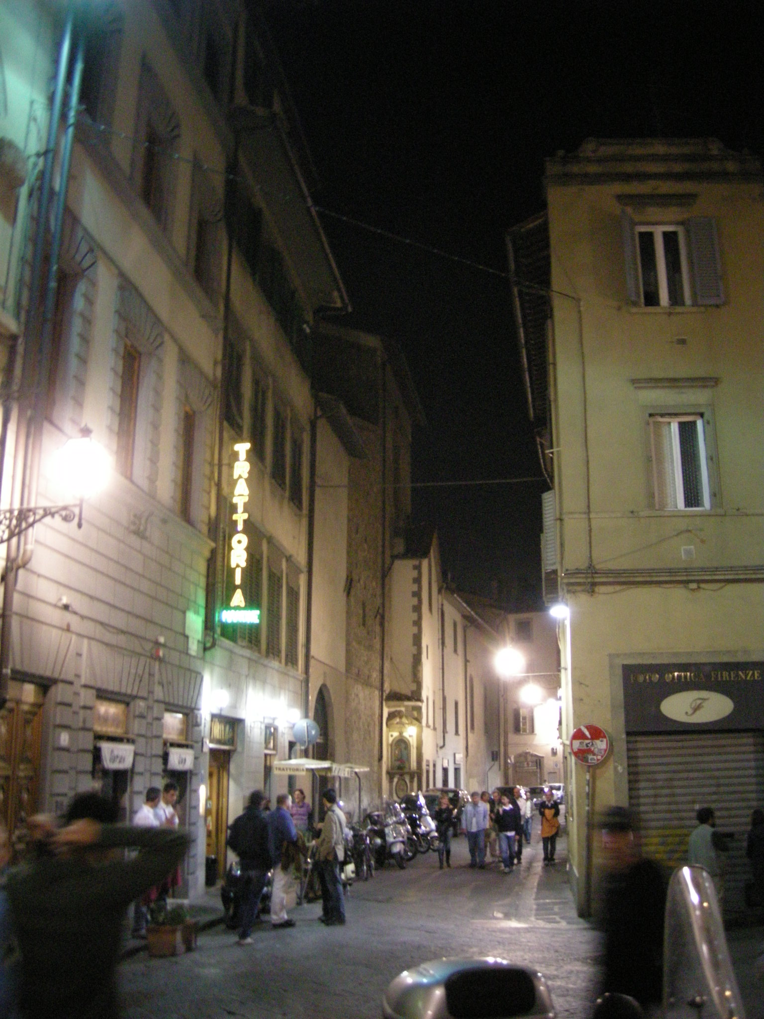 Via della spada by night